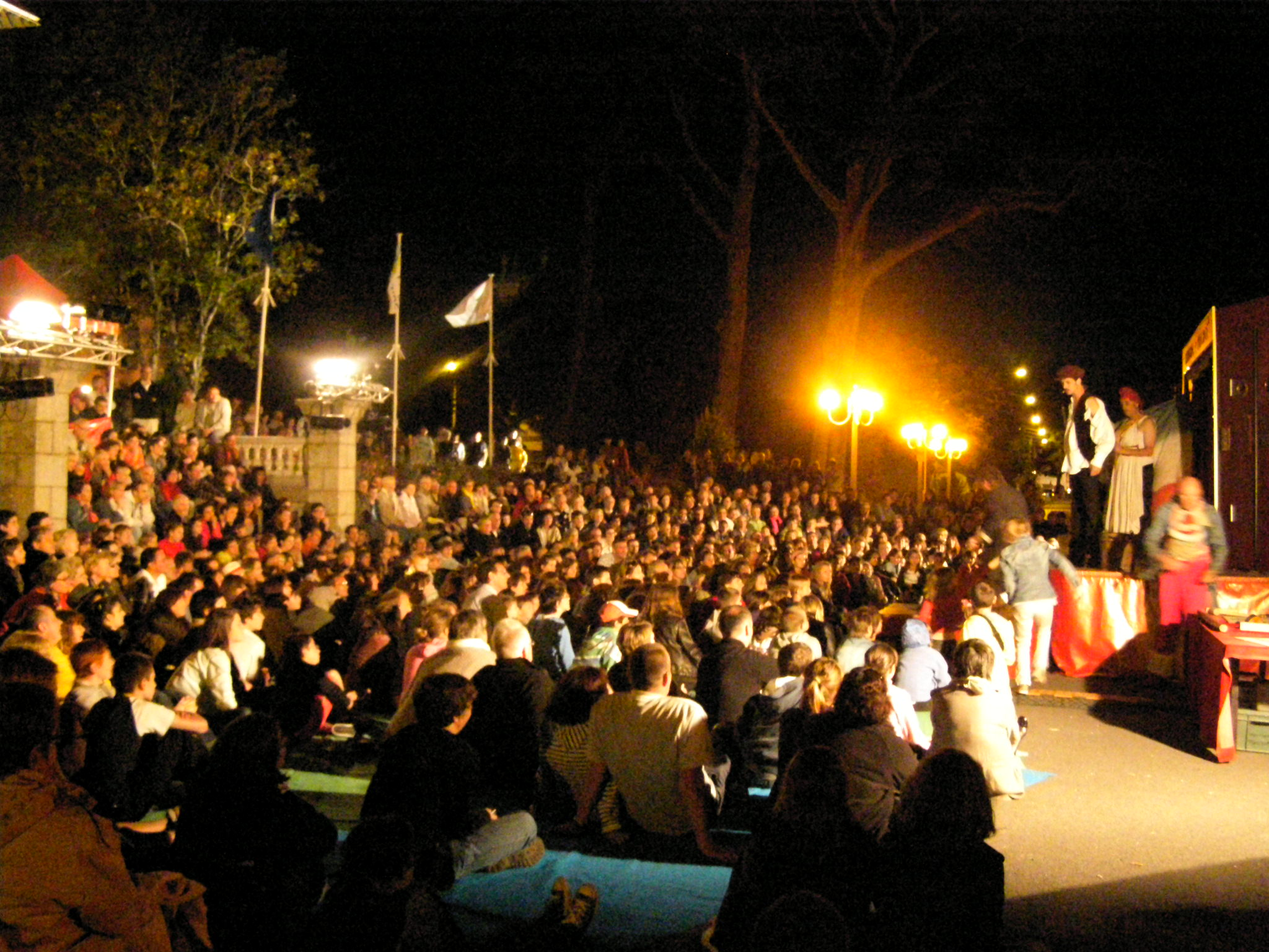 Soirée festival Renc'Arts avec théâtre de rue à Pornichet